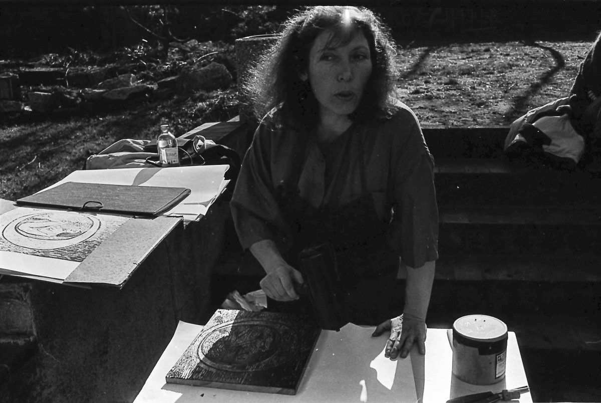 1. Alternative Buchmesse Leipzig 1990, die Grafikerin Rosemarie Heinze beim Vorbereiten